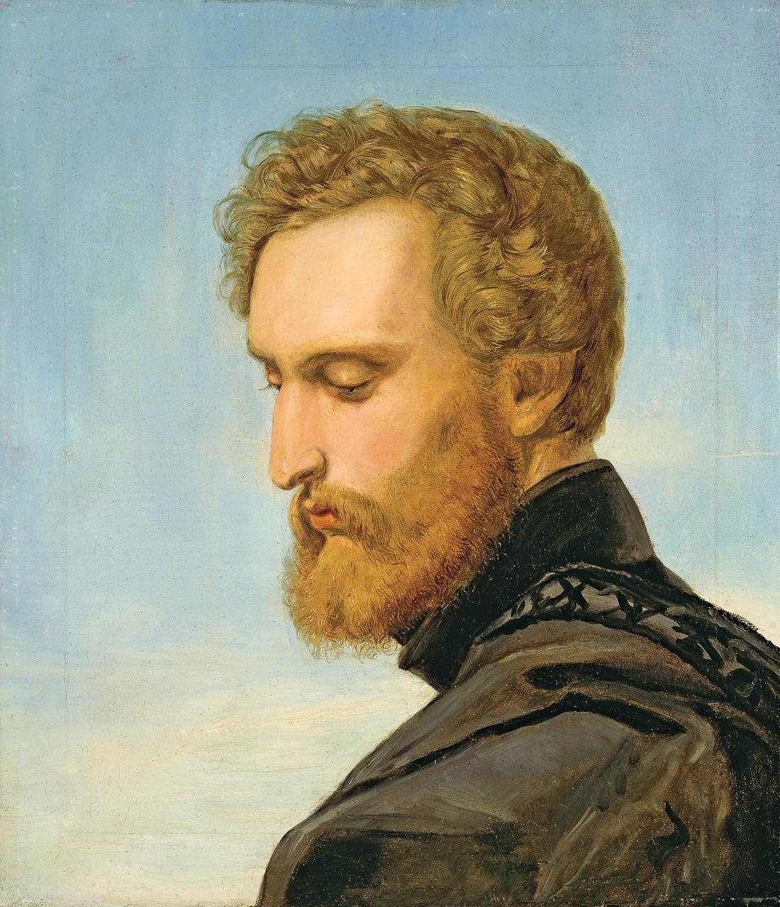 Porträt des Malers Heinlein als Ritter Schellenberg